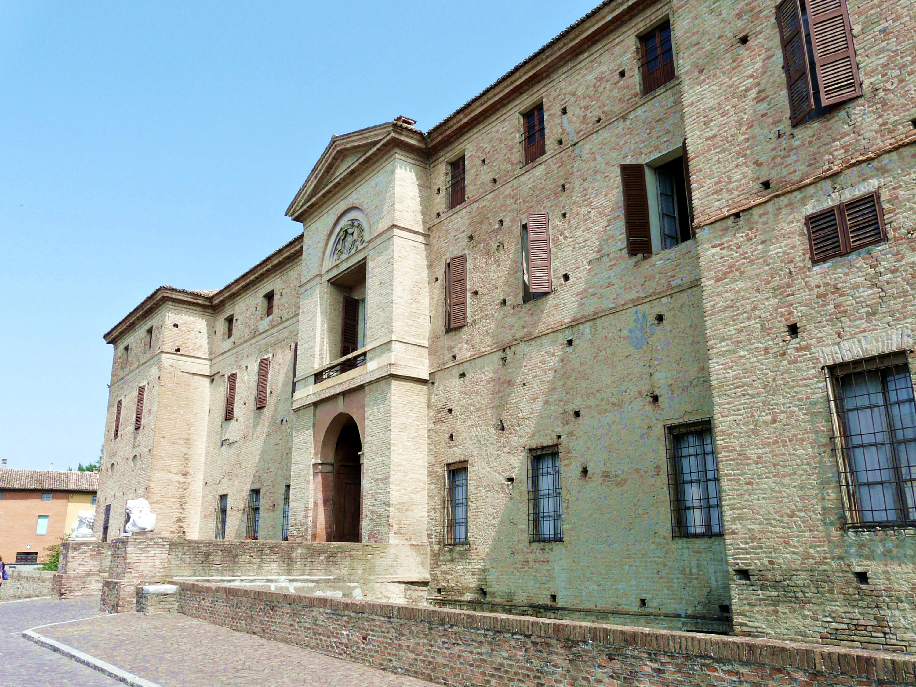 Rocca Meli Lupi, Soragna, Emilia-Romagna, Italia